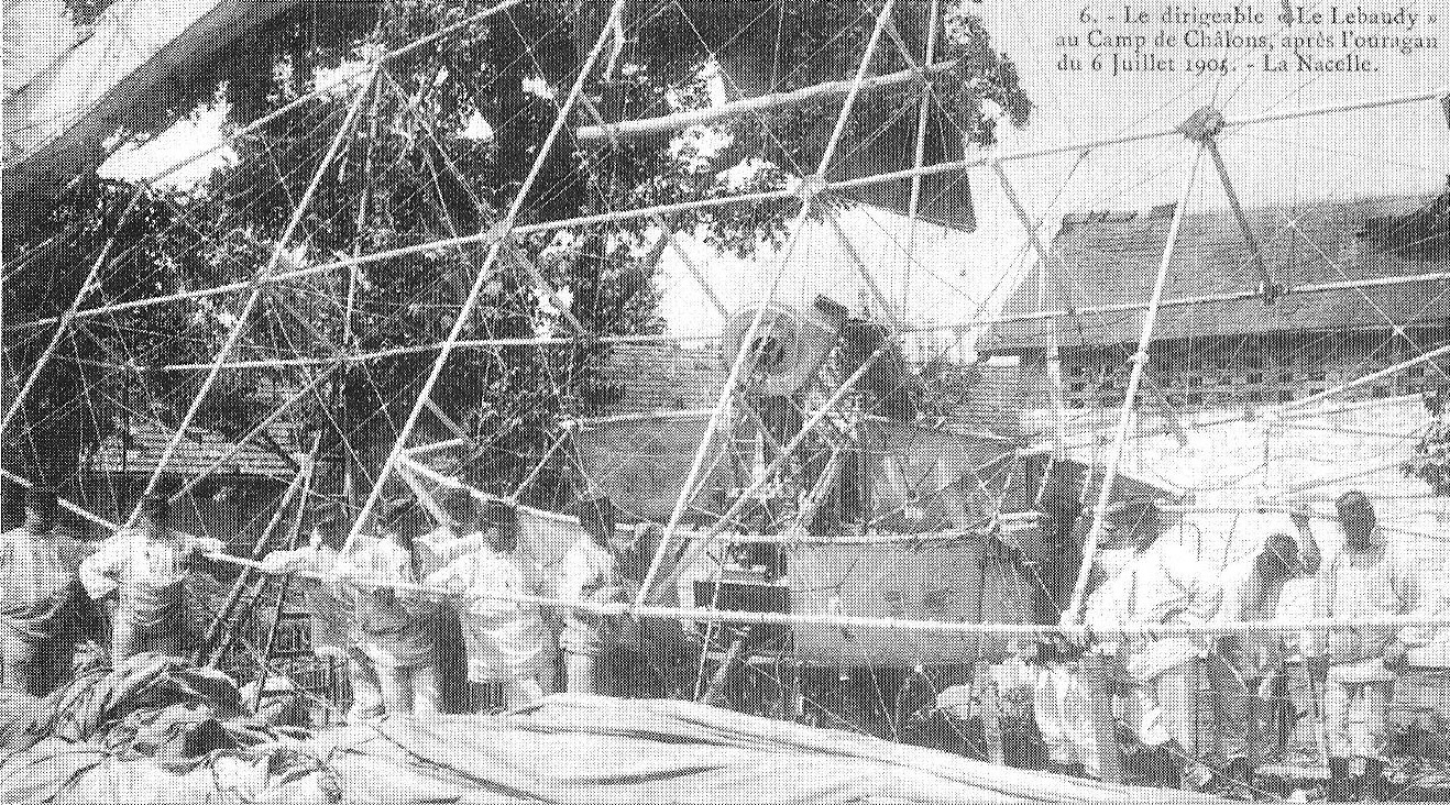 Le hangar du dirigeable Lebaudy après l'ouragan qui a devasté le camp de Châlons.